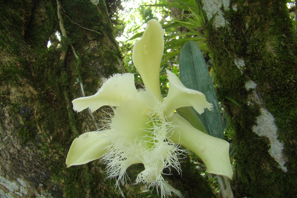 Rhyncholaelia digbyana - La flor nacional de Honduras floreciendo en mi jardín